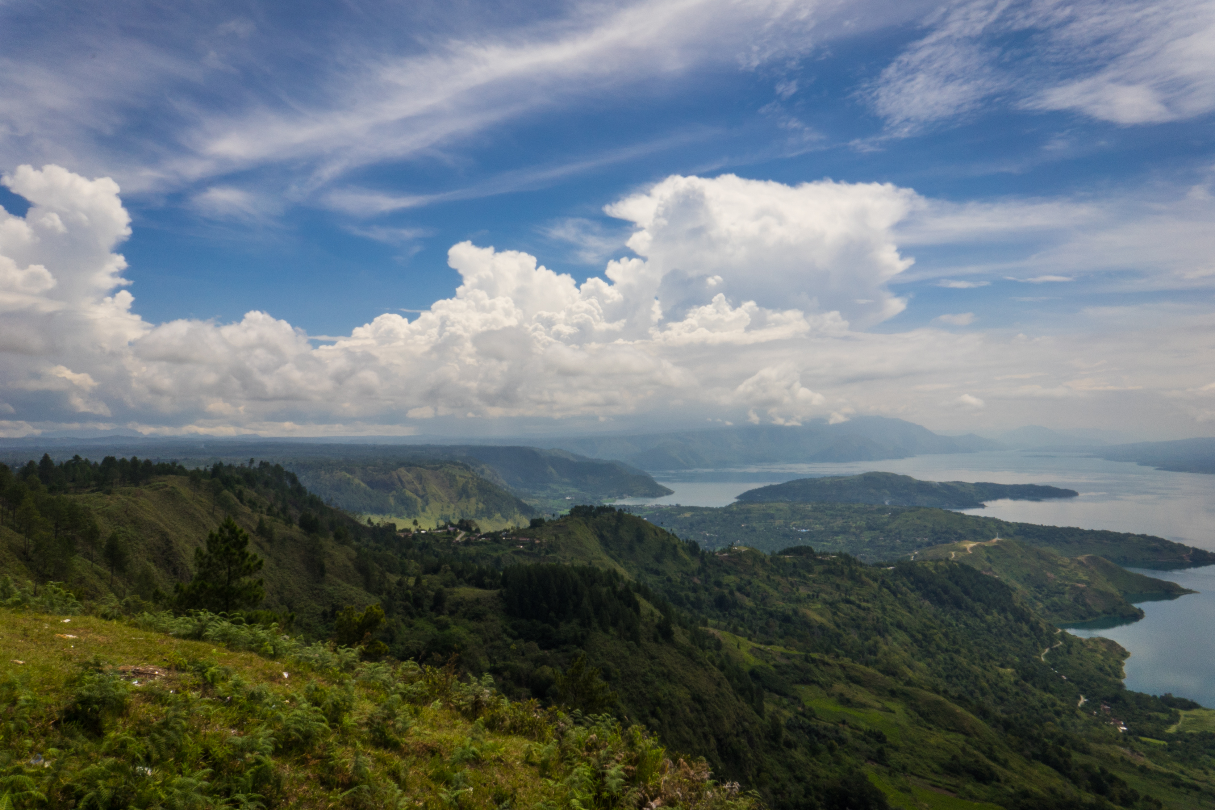 Foto ini diambil dari perbukitan yang mengelilingi danau Toba (Sumatera Utara). Terlihat pada bagiah tengah dan kiri foto bukit yang saling berlapis dan langit yang biru berawan